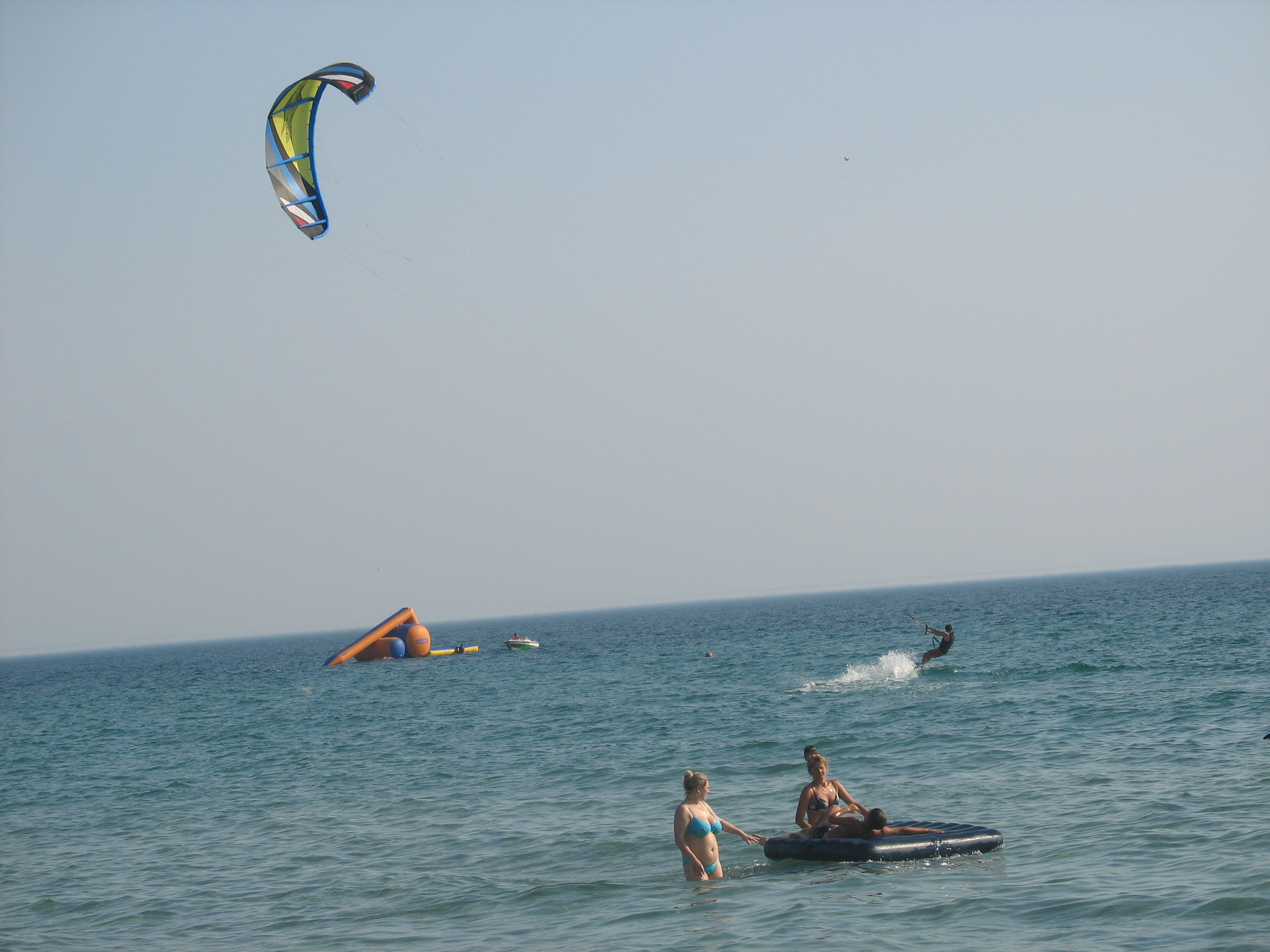 Кайт на пляже в Мирном